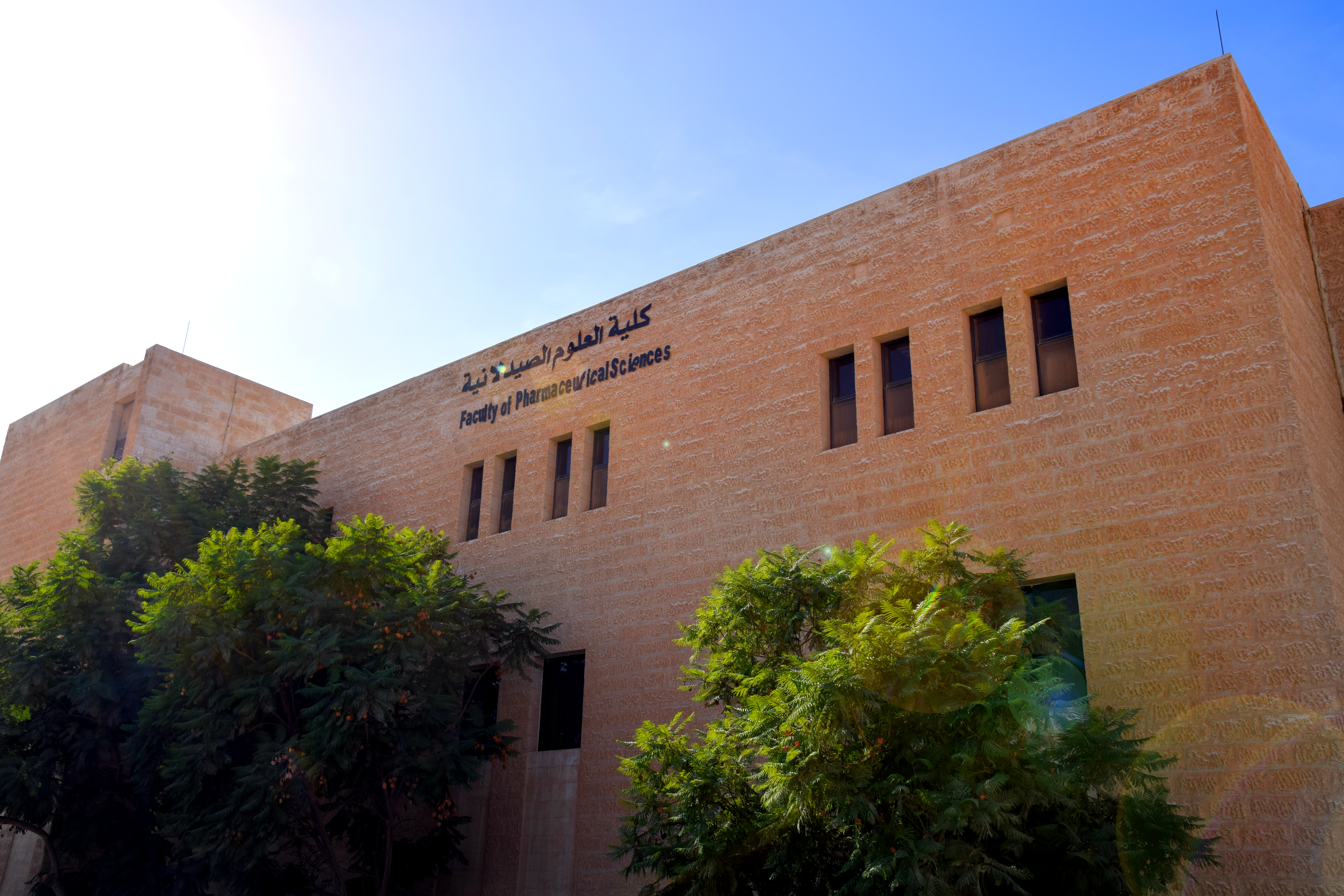 الهاشمية